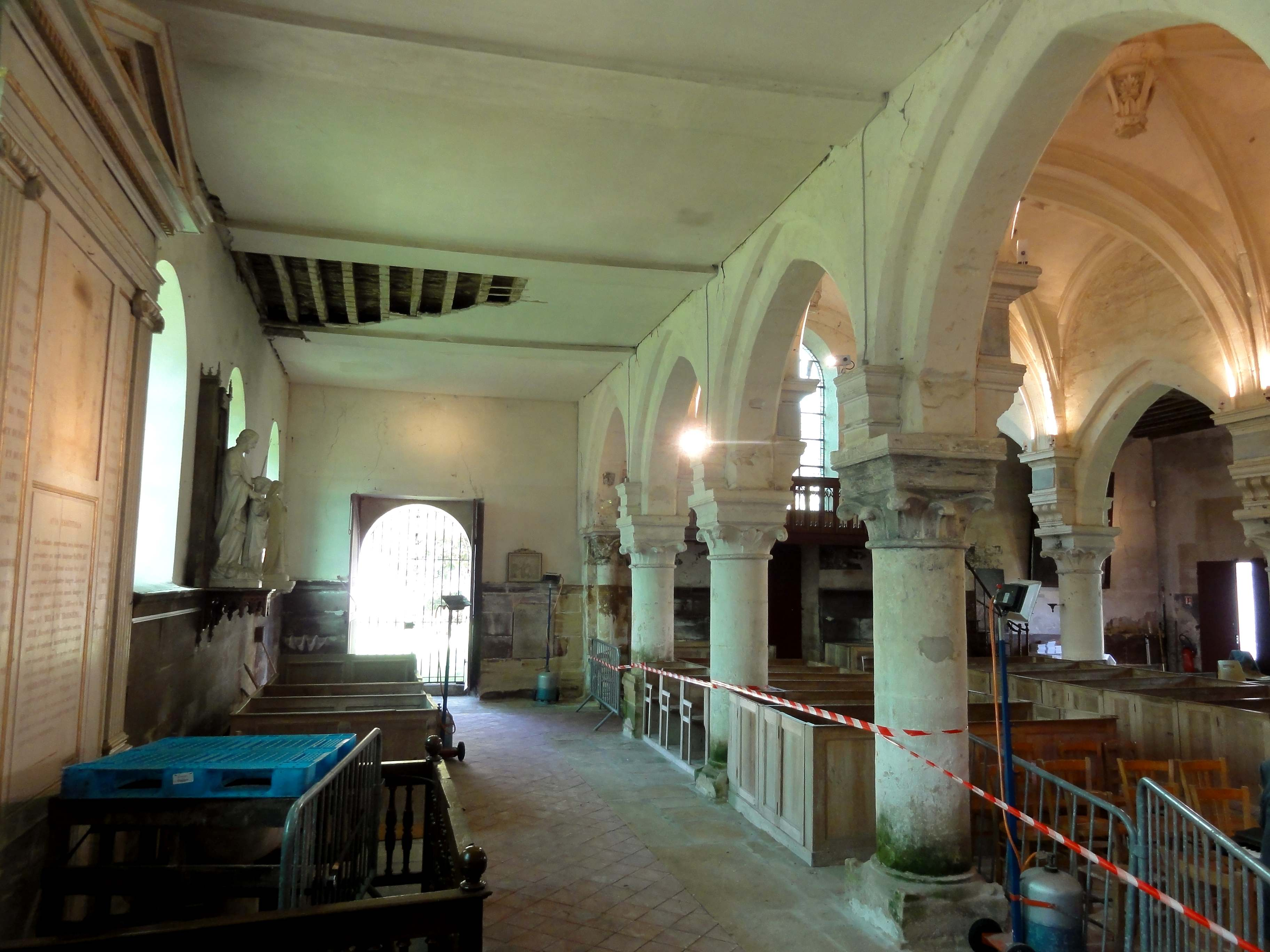 Intérieur de l'église (voir titre).